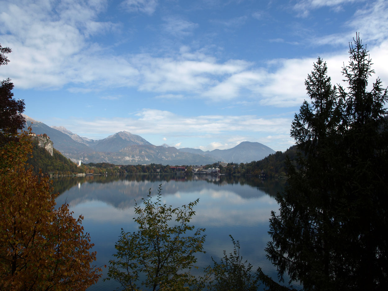 Blick von der kleinen Insel auf das Festland